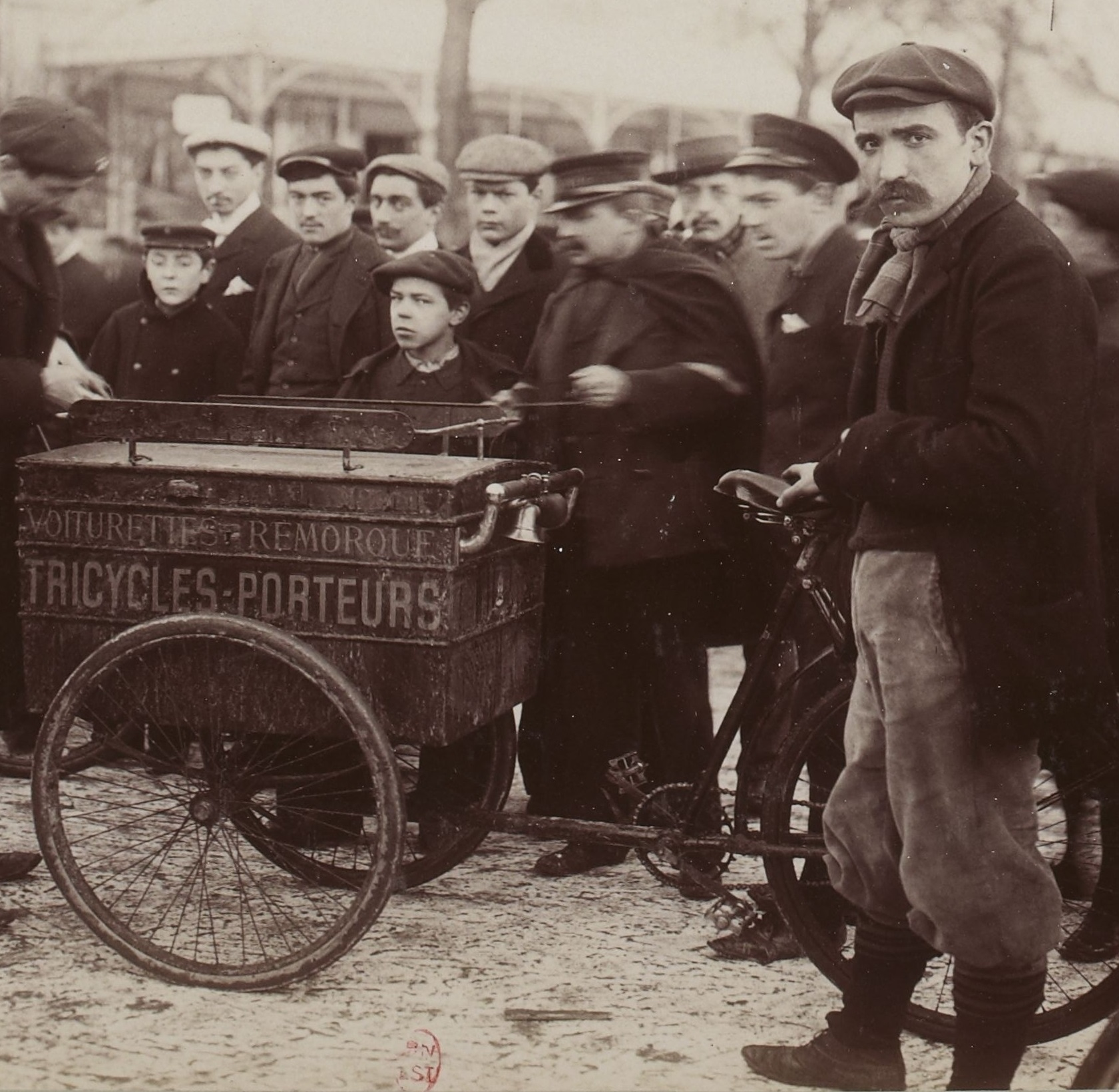 [Collection Jules Beau. Photographie sportive] : T. 16. Années 1901 et 1902 / Jules Beau : F. 25v. [Course de Tri-Porteurs, 26 janvier 1902]